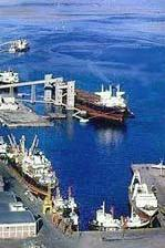 Le port de Bahia Blanca, vue aérienne